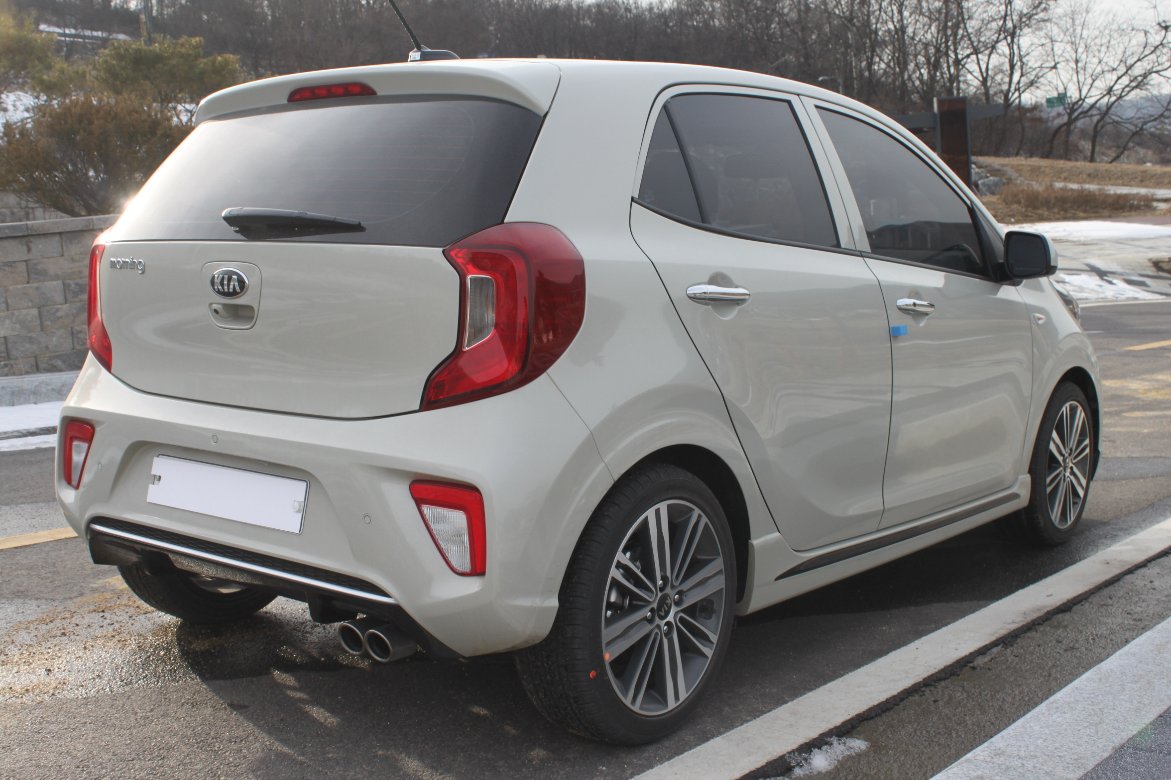 기아 모닝(3세대) 후측면